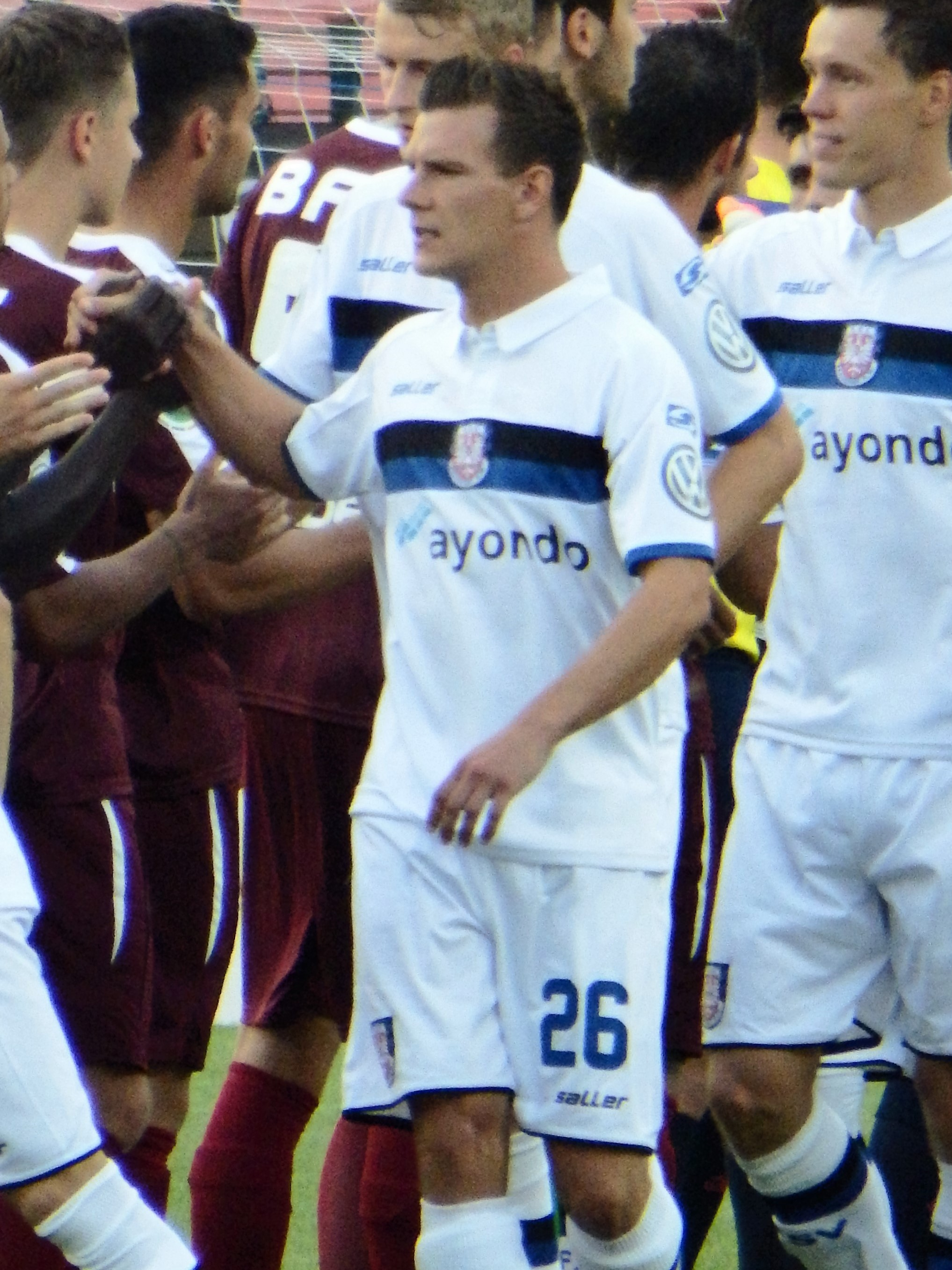 Denis Epstein, FSV Frankfurt